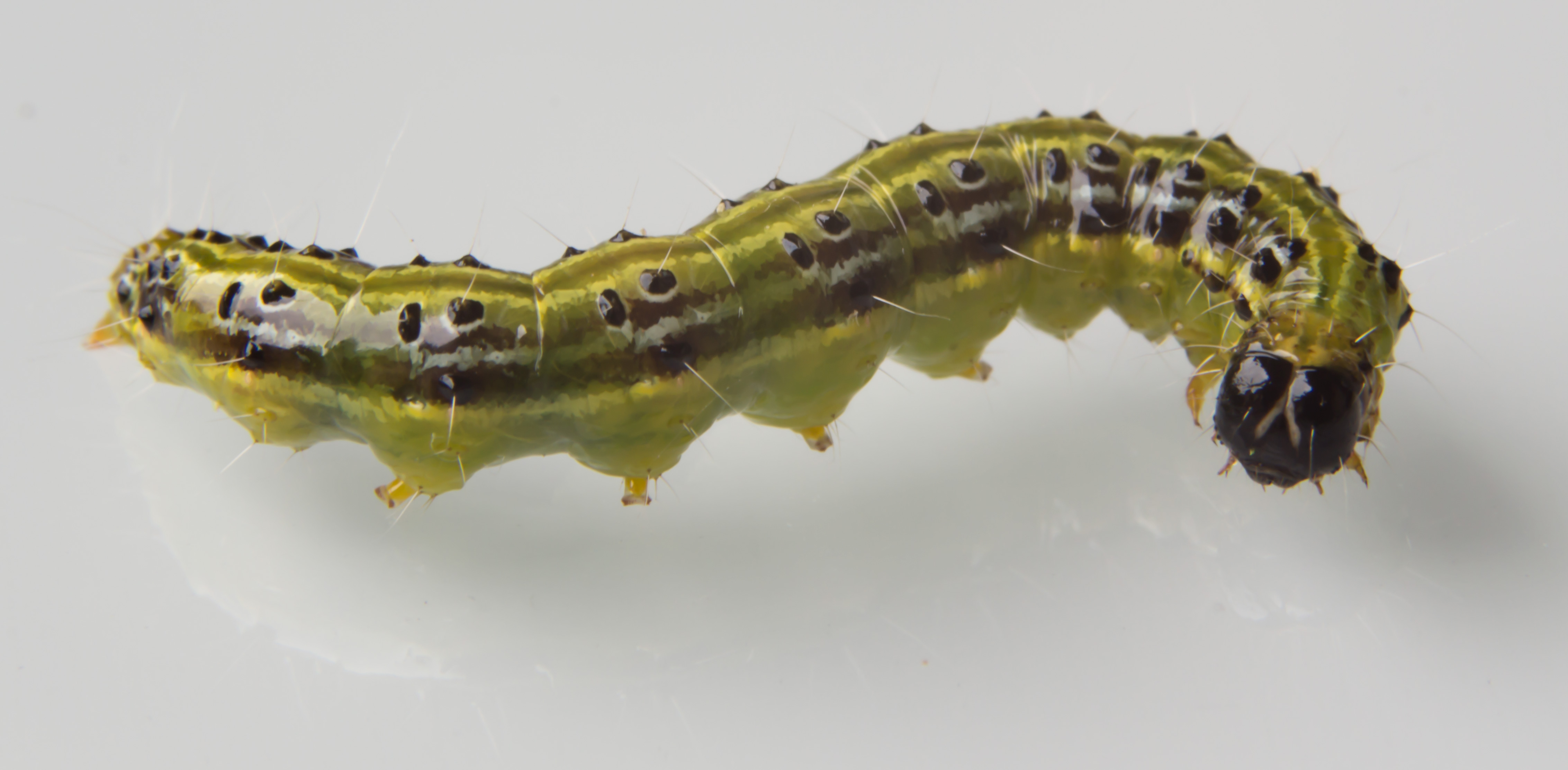 ausgewachsene Raupe eines Buchsbaumzünsler (5cm Länge)